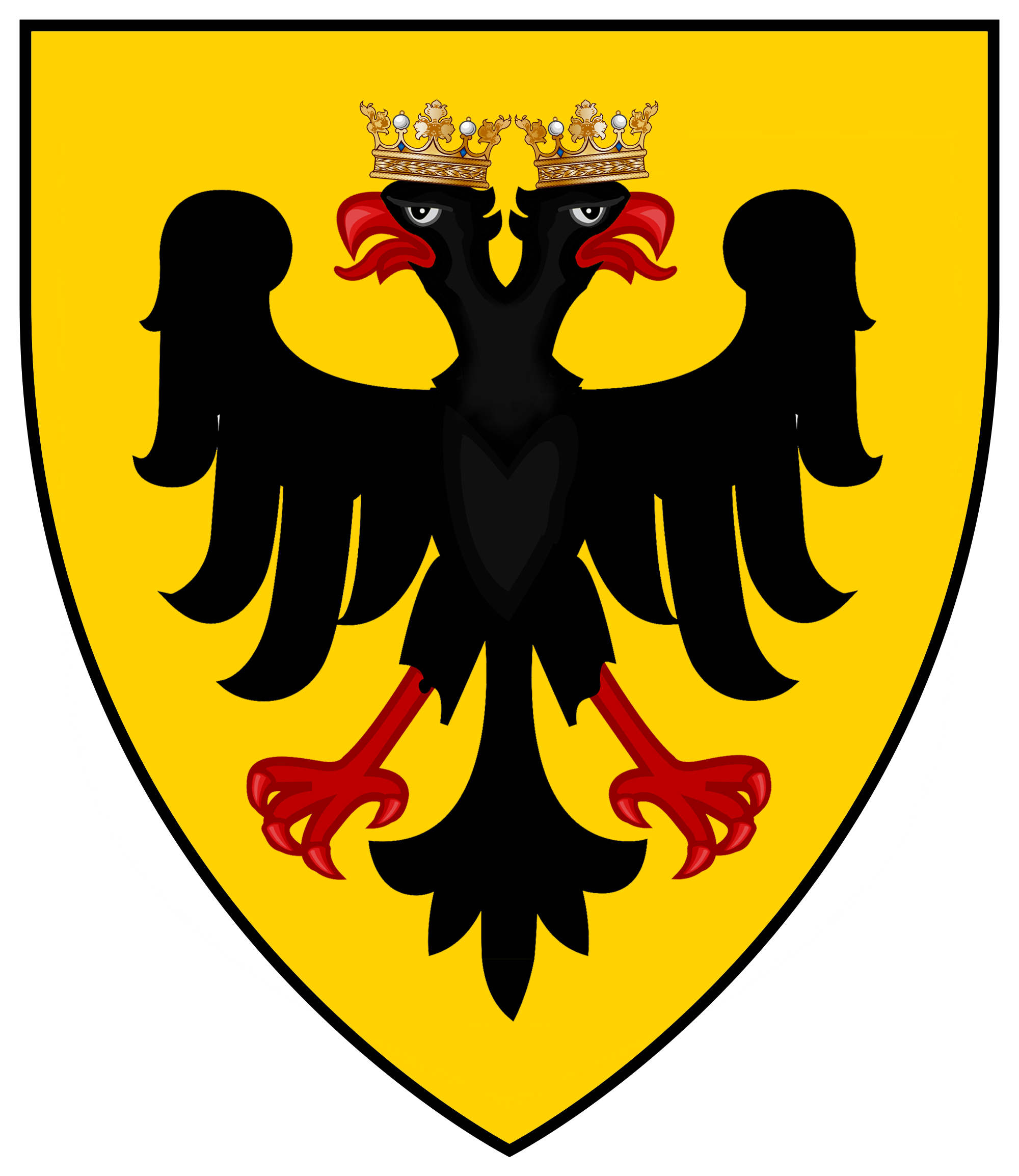 Balogh nembeli Derencsényi